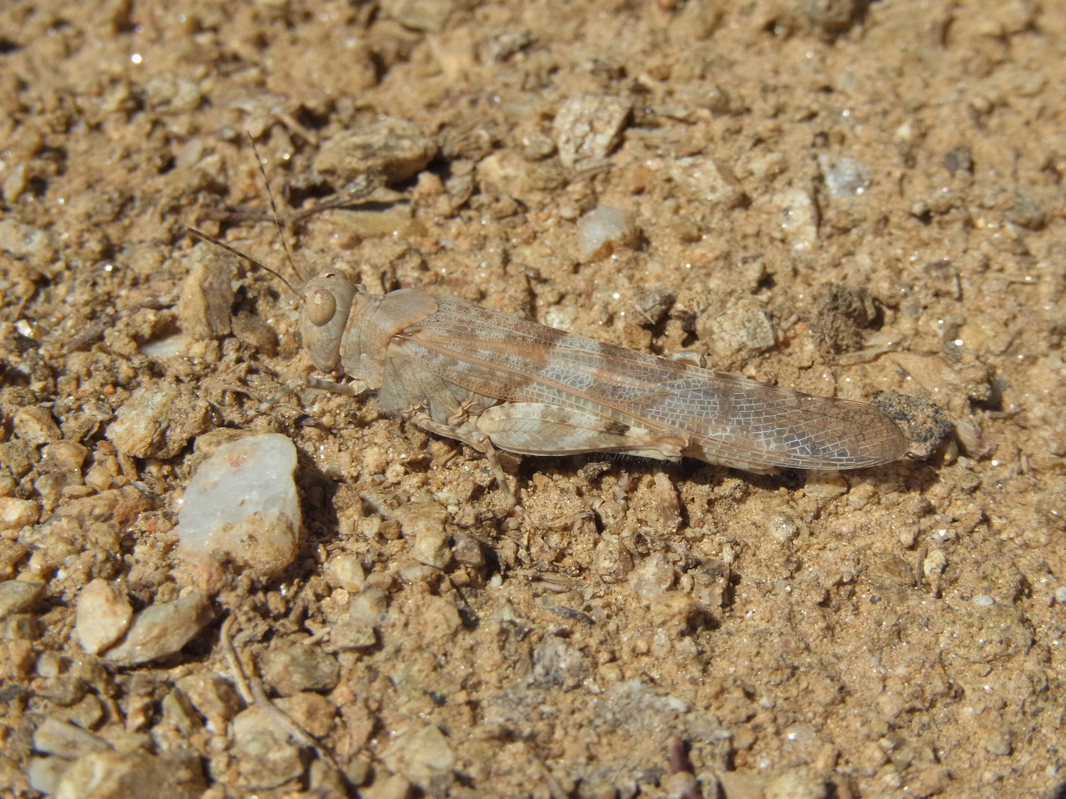 Südliche Sandschrecke (Sphingonotus rubescens), bei Kástro, Thasos/Griechenland